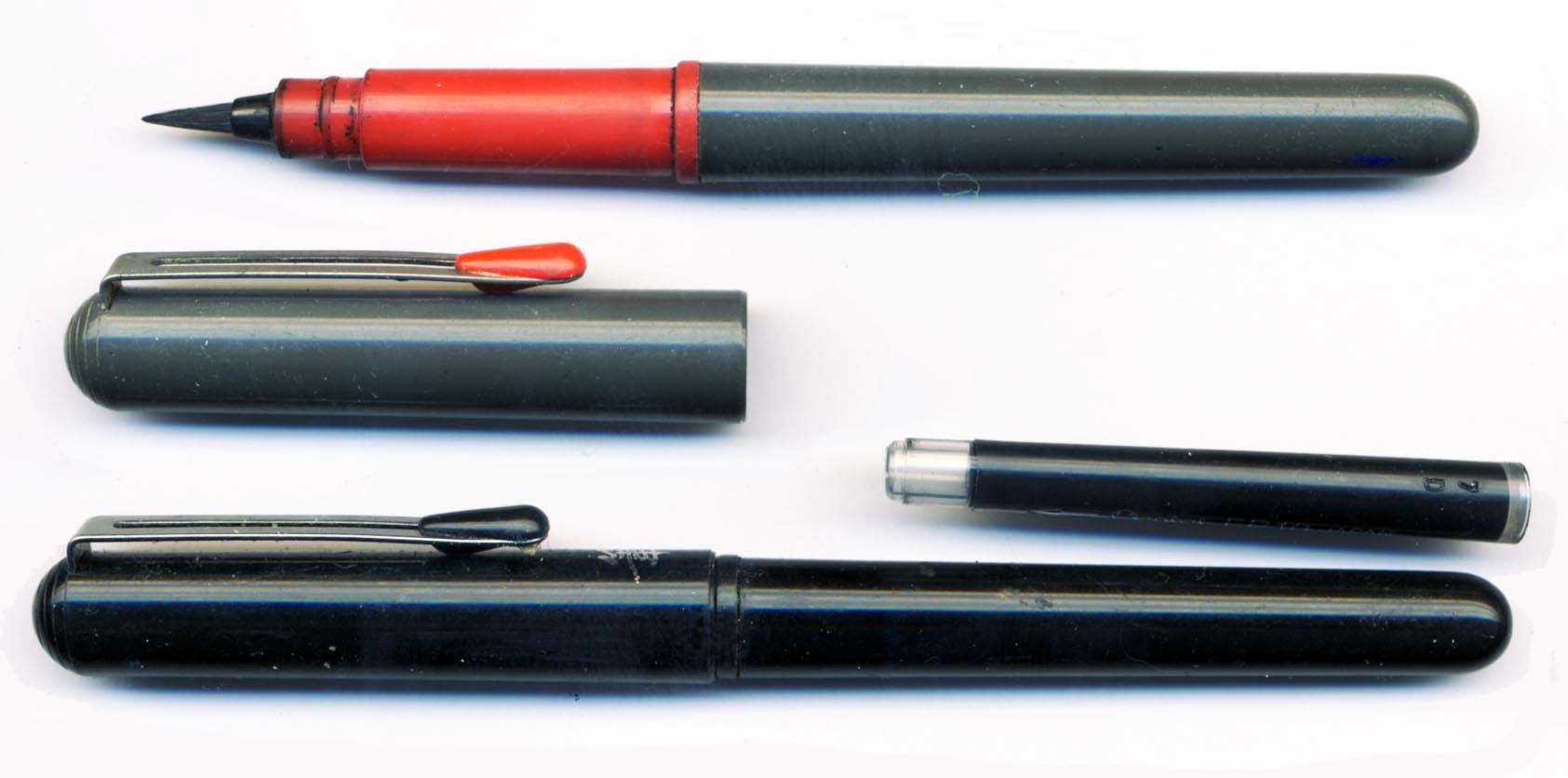 Stylo-pinceau (fude pen) Brush Pen Pentel, ancien modèle et modèle actuel, cartouche d'encre